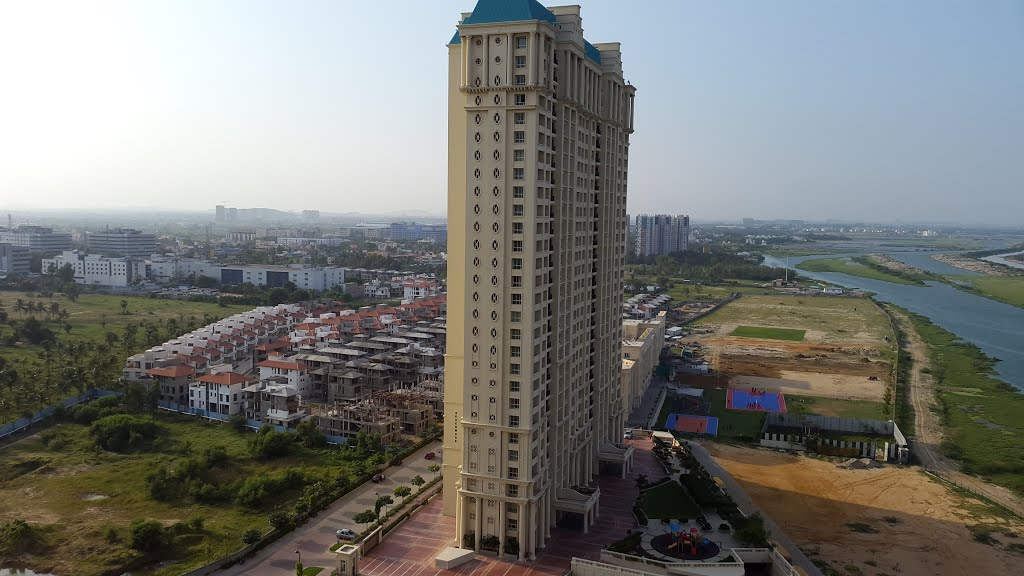 nc